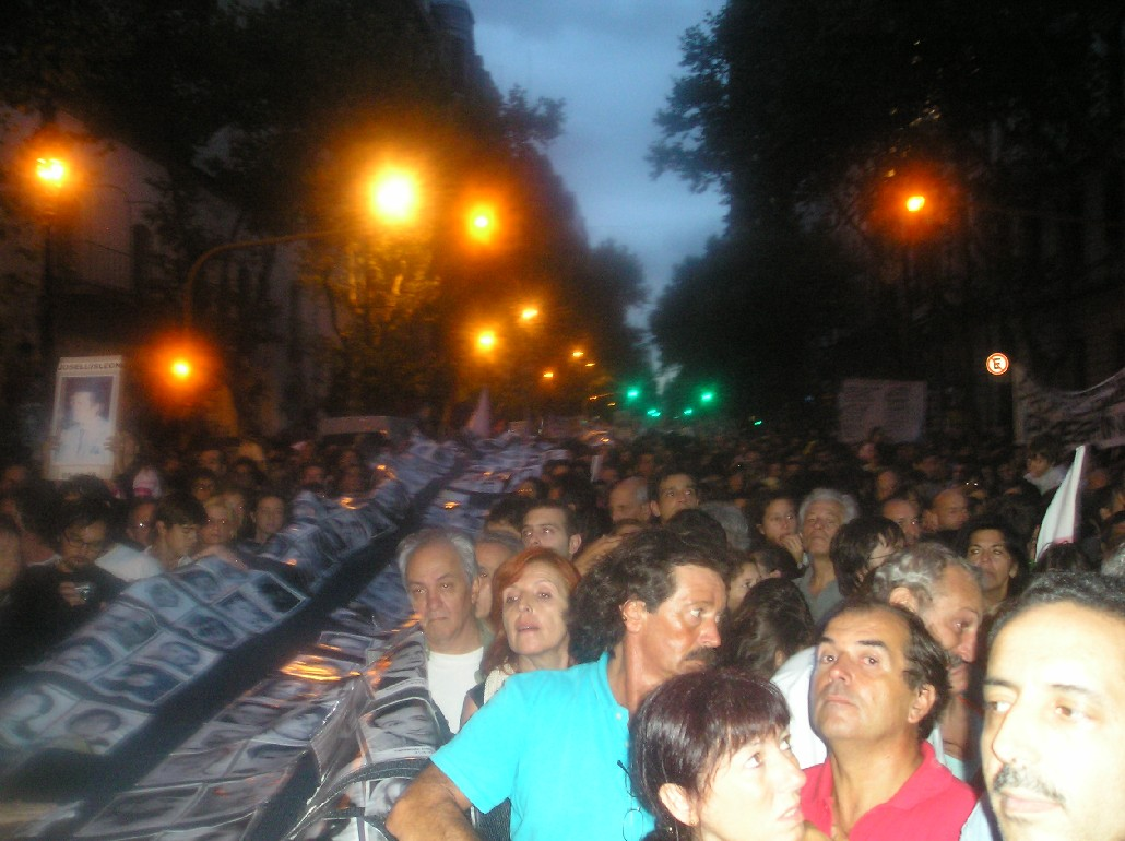 Marcha 30 años del golpe militar de 1976. Buenos Aires.